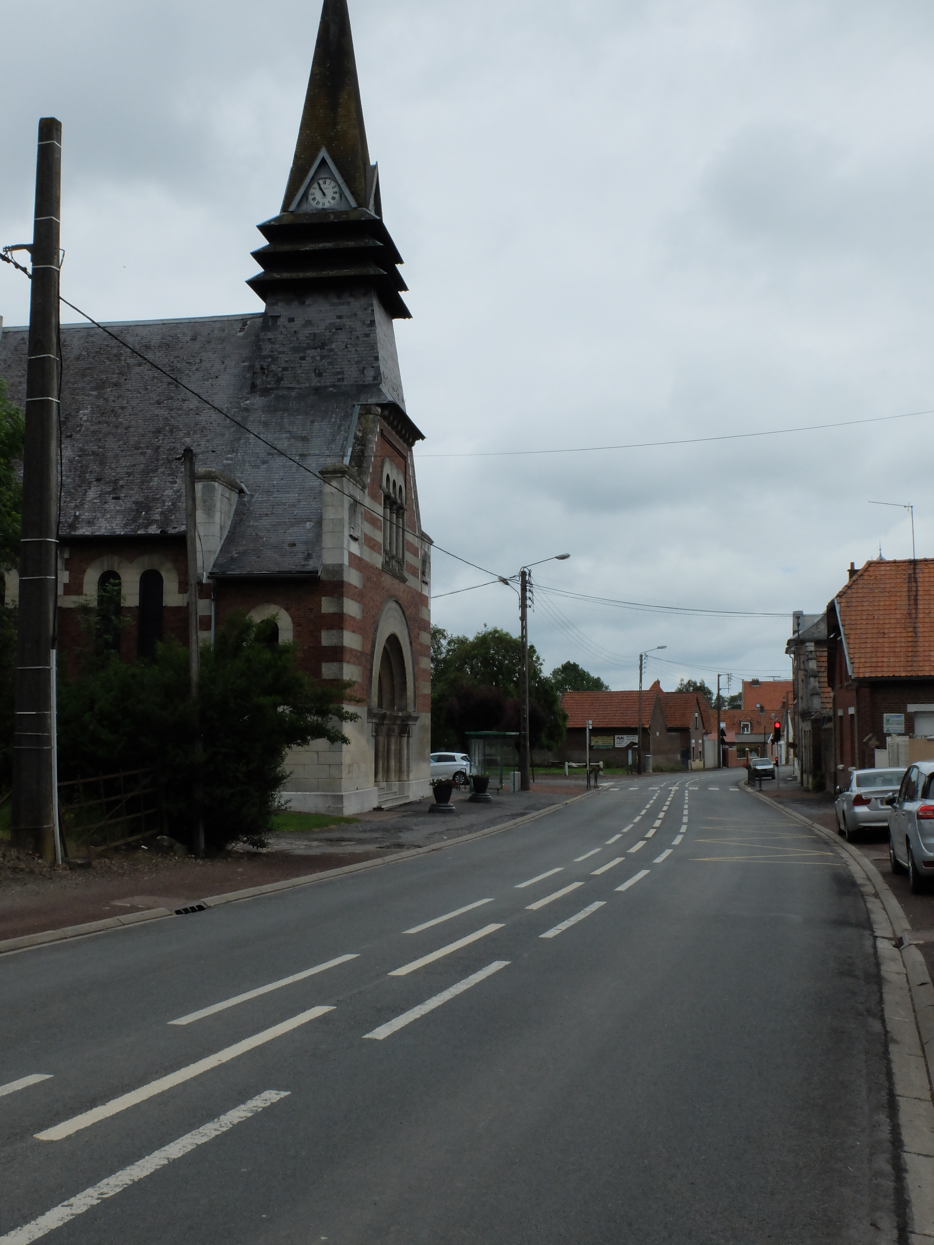 Vue de la Grand Rue d'Hendecourt-lès-Cagnicourt, avec à gauche l'église Saint-Léger.